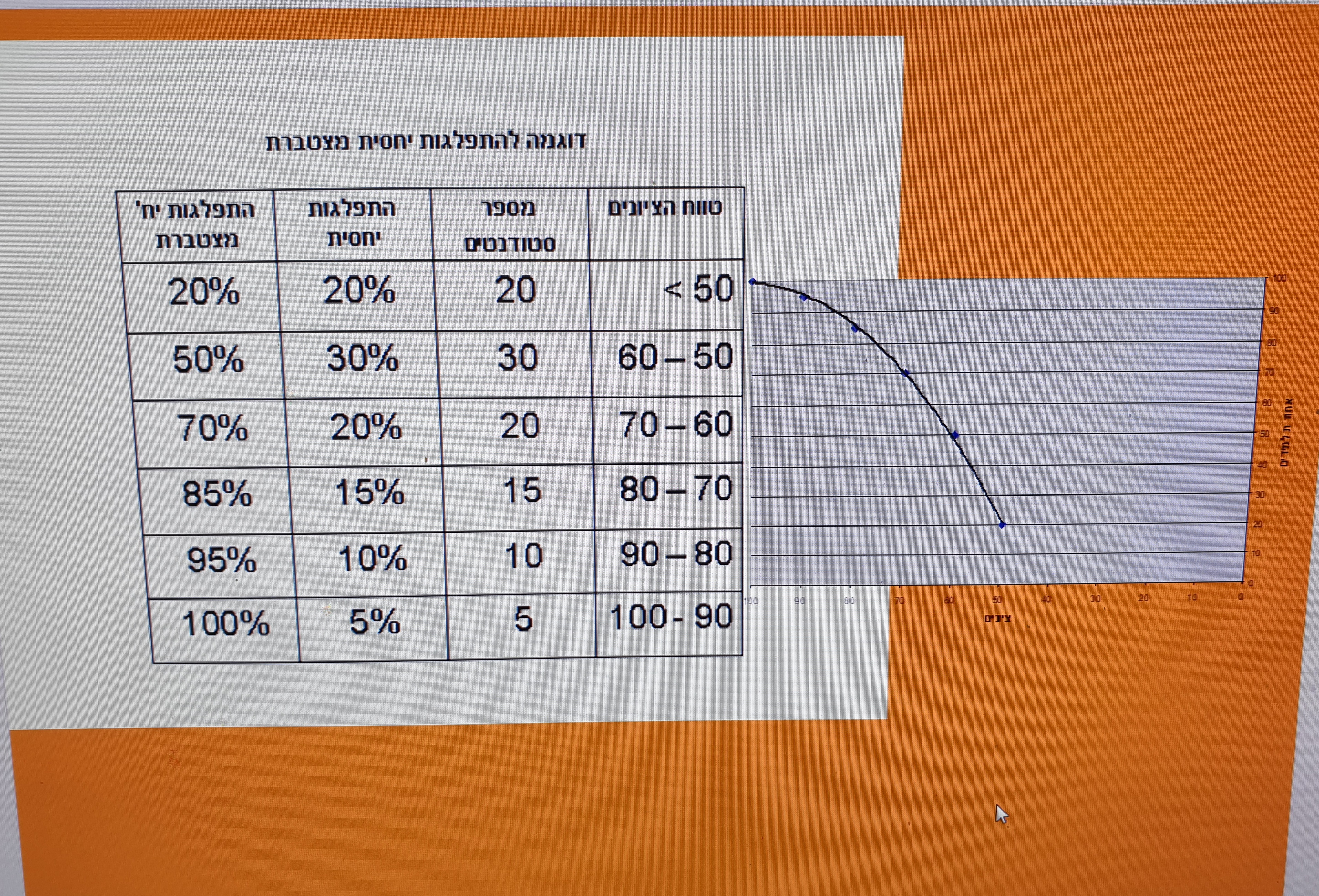 דוגמה לעקומה יחסית מצטברת